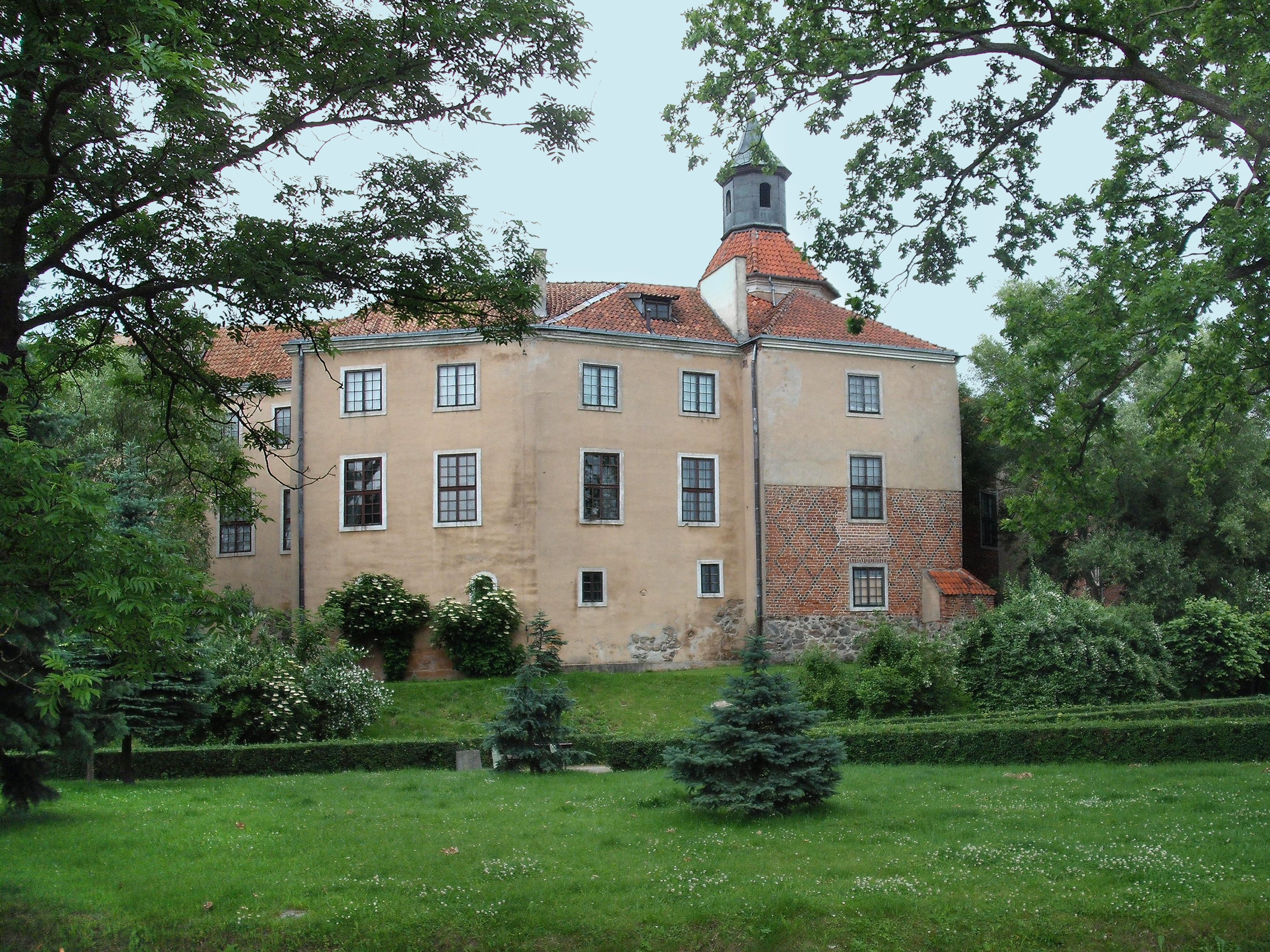 widok od strony parku Morąg, Morąg (miasto)